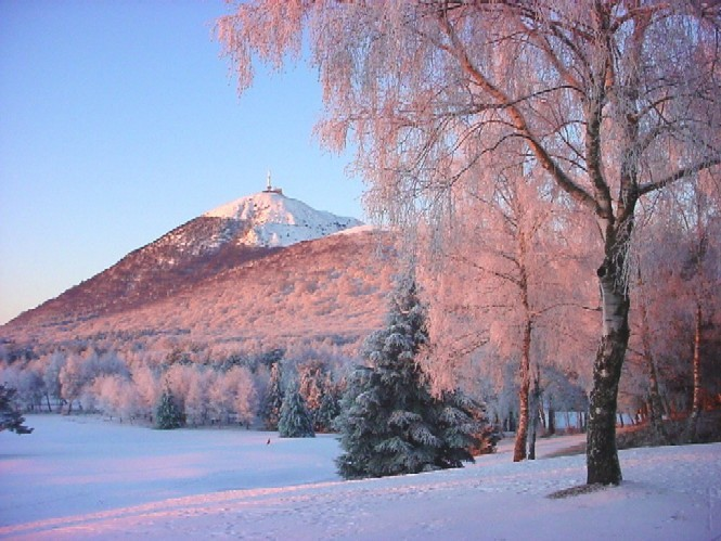 Golf des volcans